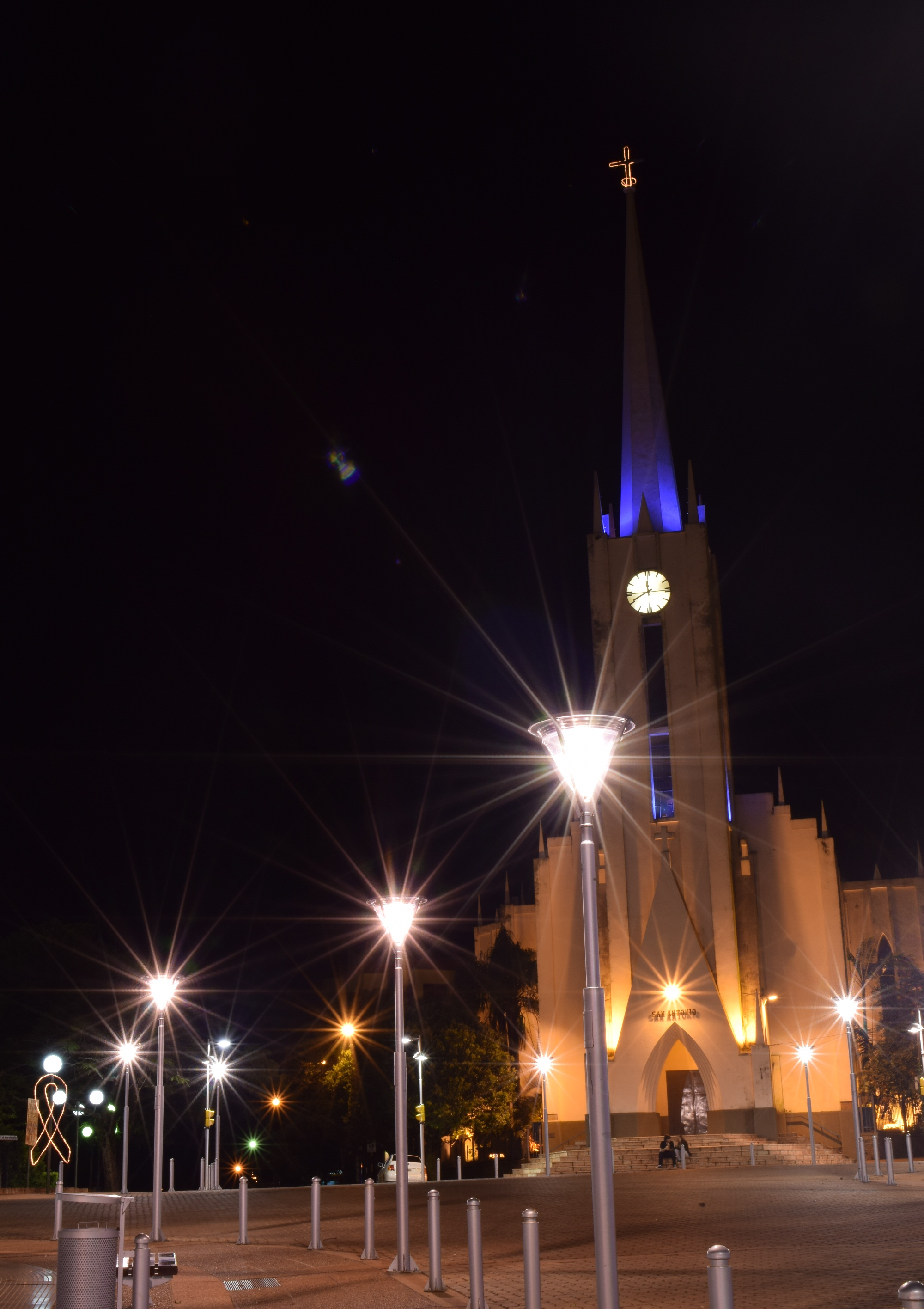 Vista de la Catedral San Antonio en el reciente inaugurado centro cívico de la ciudad de Oberá, Misiones.